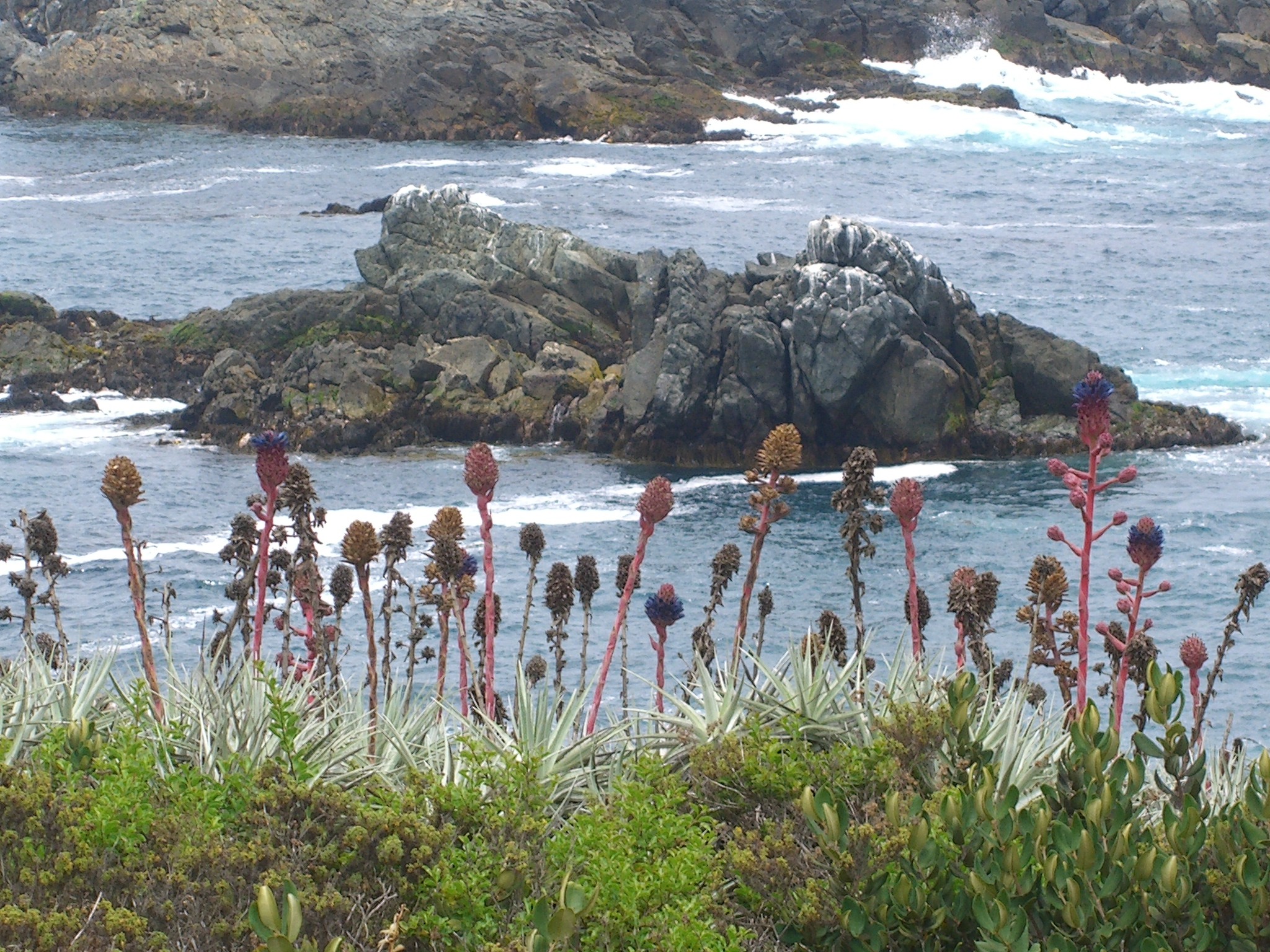 Roqueríos y vagetación costera en Los Molles, camino hacia "El Puquén"